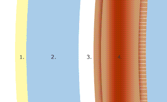 Overzicht traanvocht op oogoppervlak.